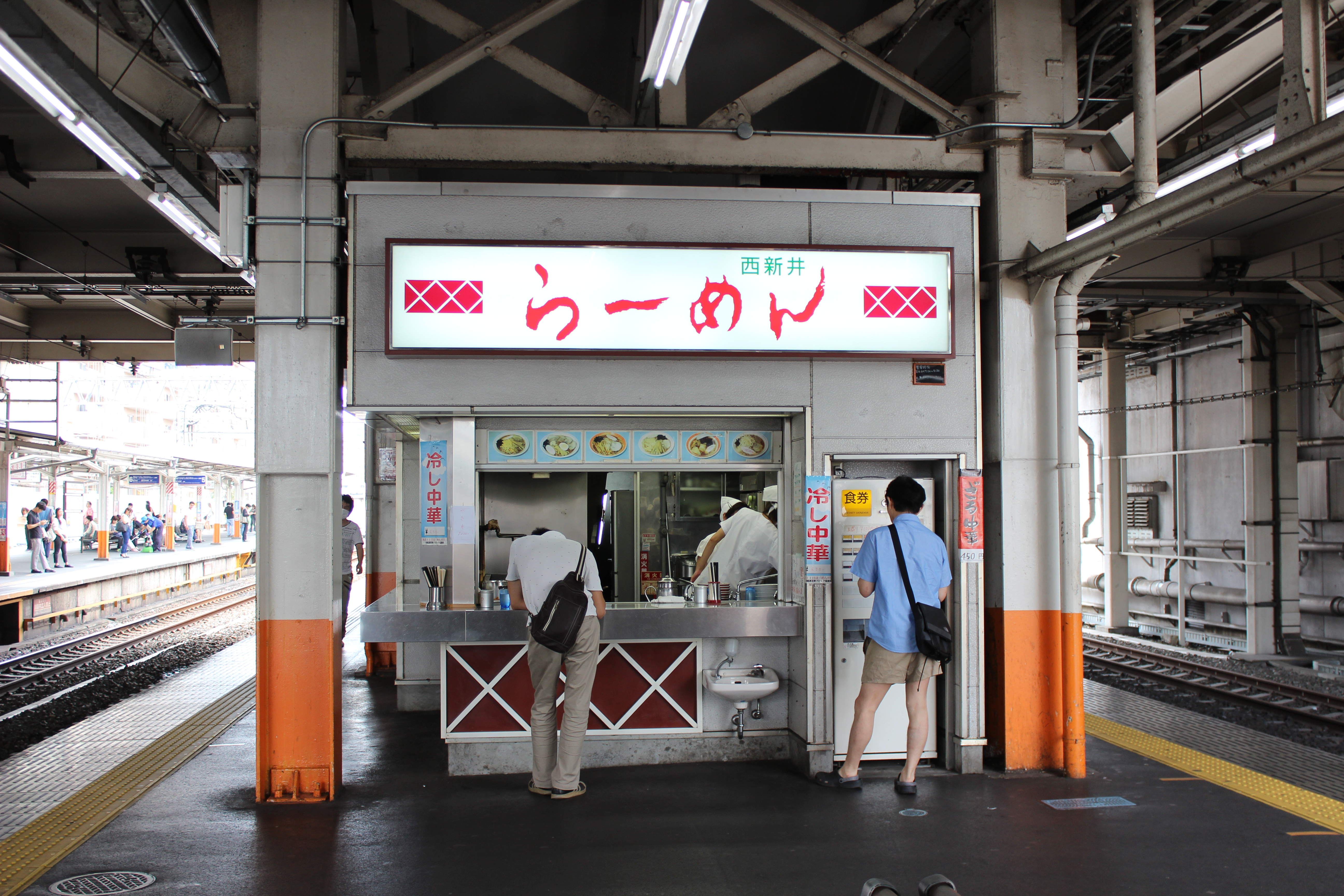 西新井ラーメン